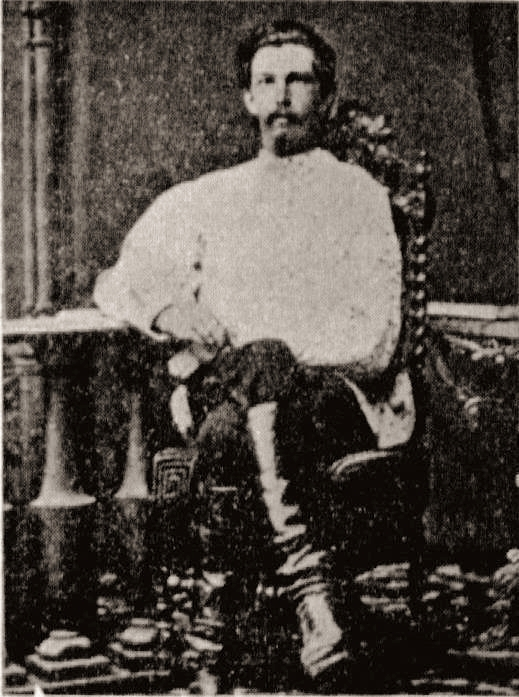 Aleksandr Konstantinovič Solov'ëv